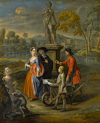 Иосиф ван Акен (1699-1749). "Продавец овощей и его сын, предлагающие товары леди около статуи Бахуса"